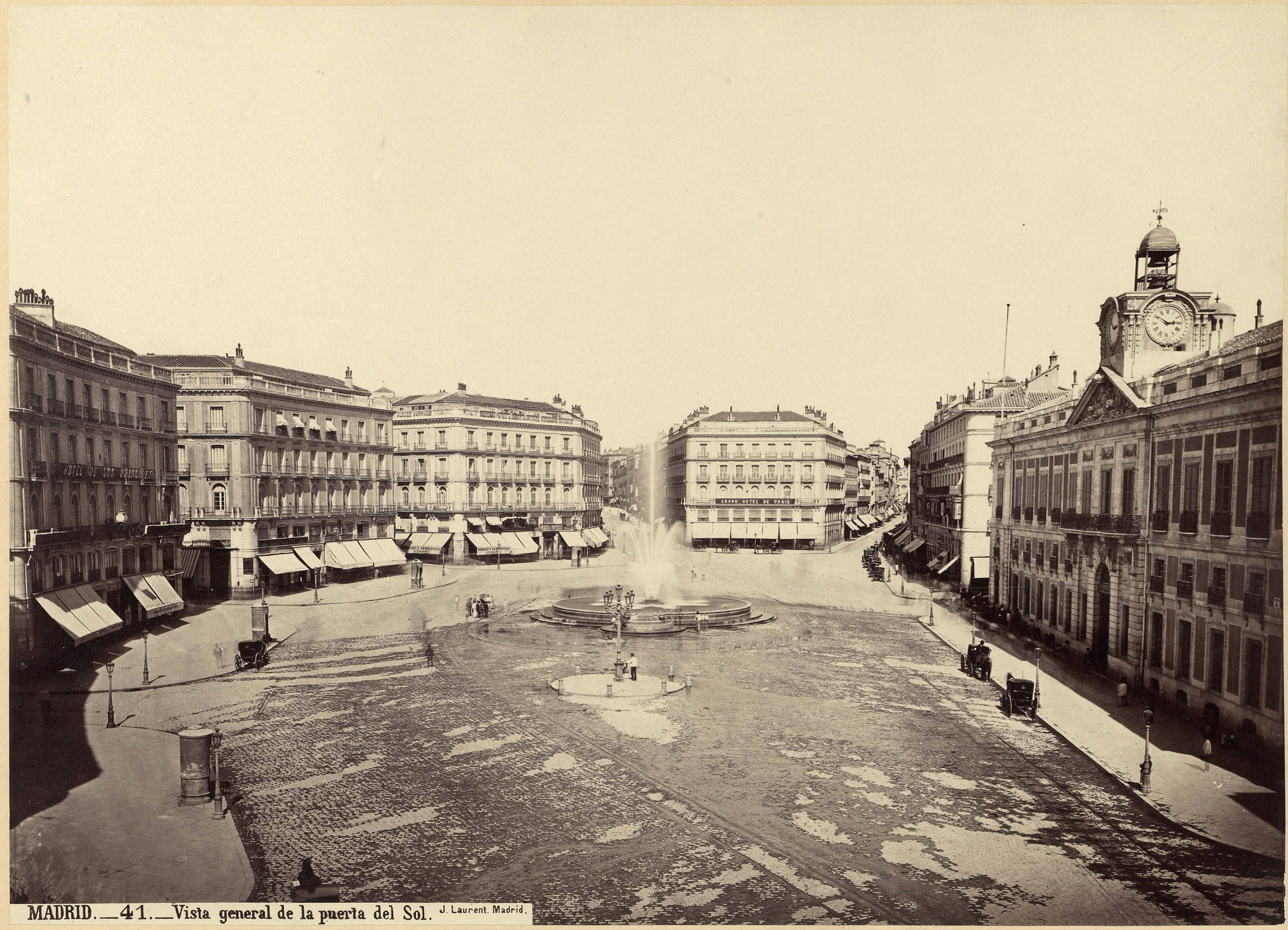 Juan Laurent, Madrid, vista general de la puerta del Sol, ca. 1870, papel albúmina.